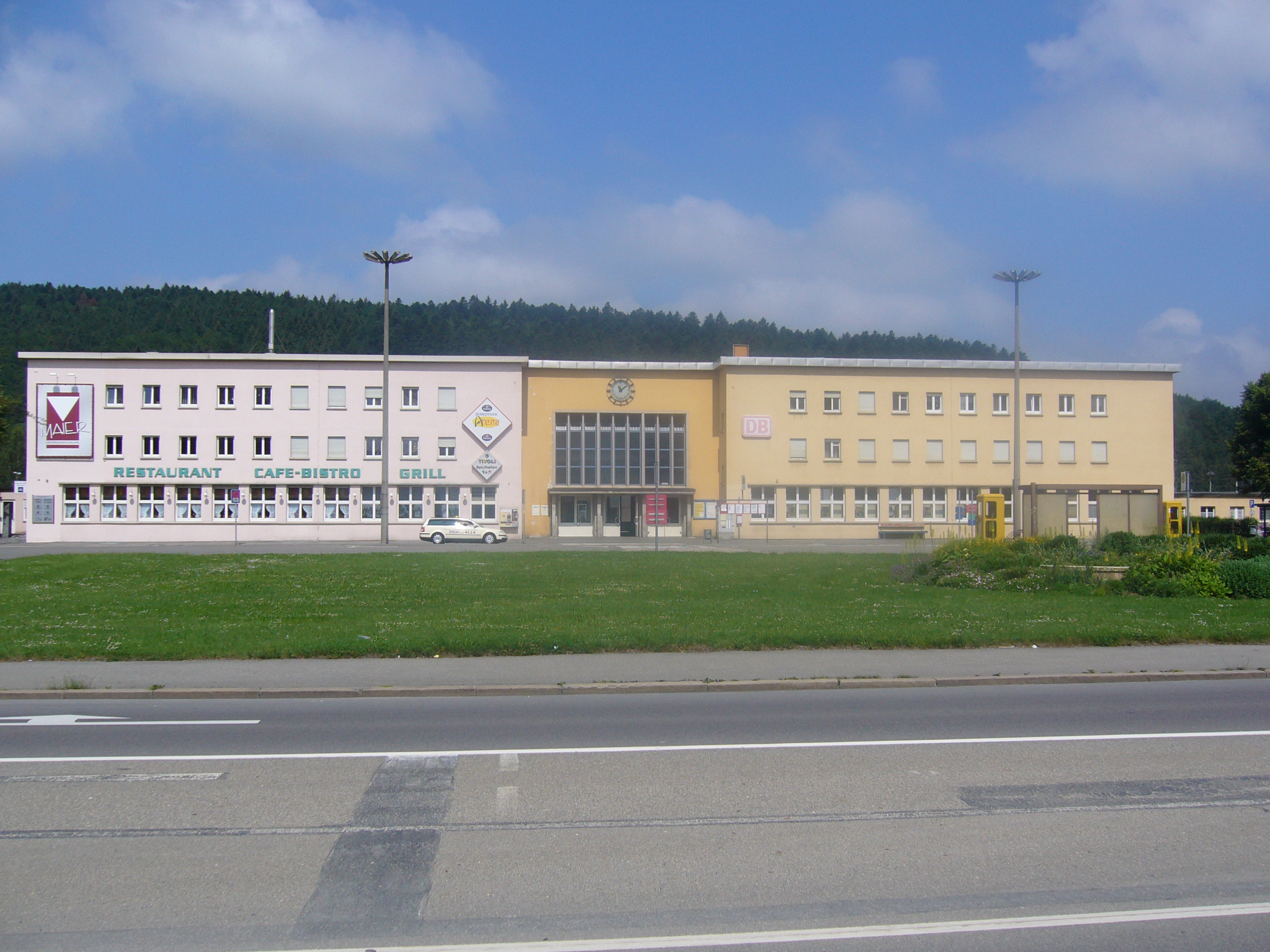 Bahnhof Tuttlingen, Empfangsgebäude, Gesamtansicht. Baden-Württemberg, Deutschland.